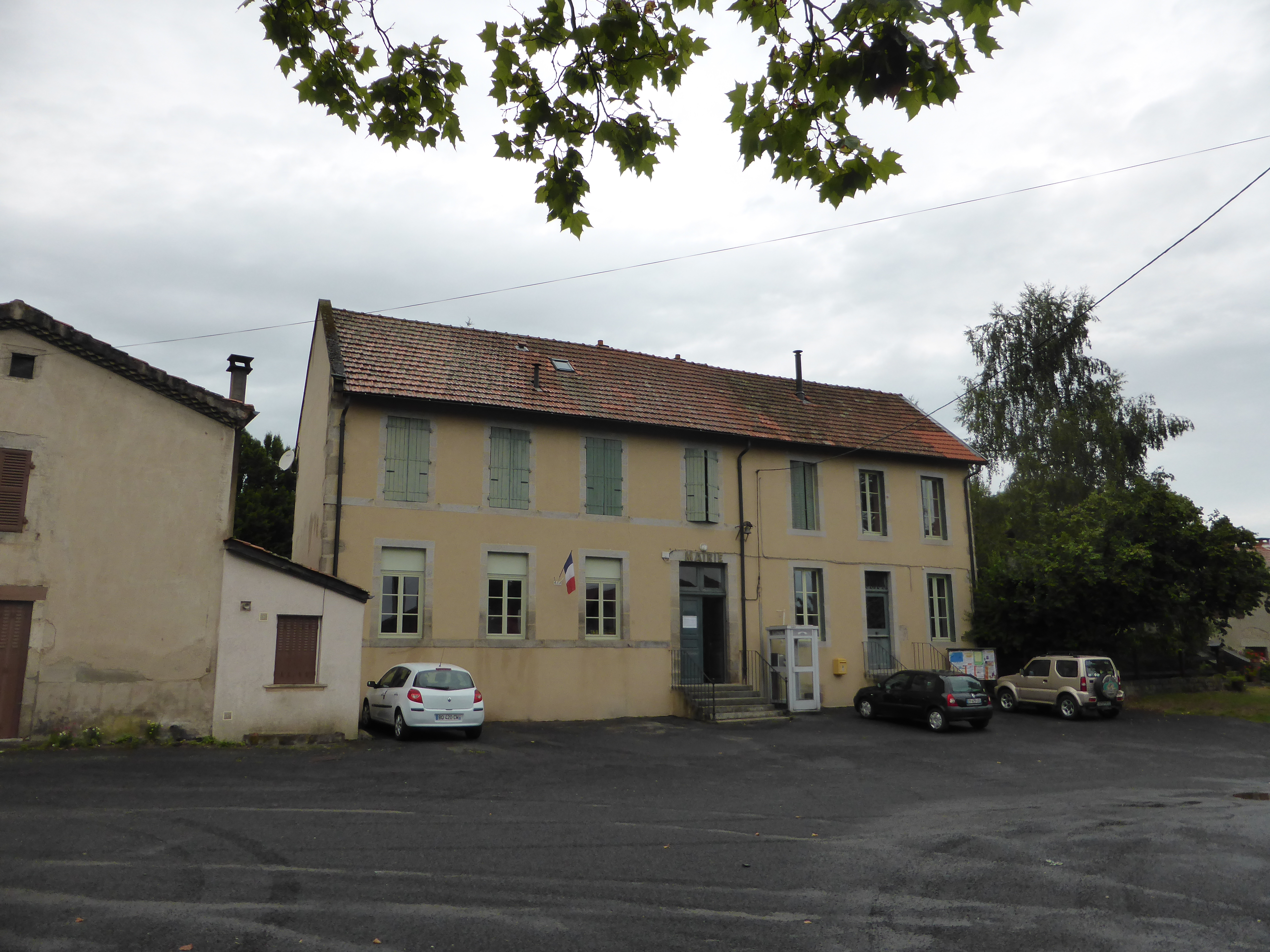 Mairie de Fayet-le-Château, dans le Puy-de-Dôme.